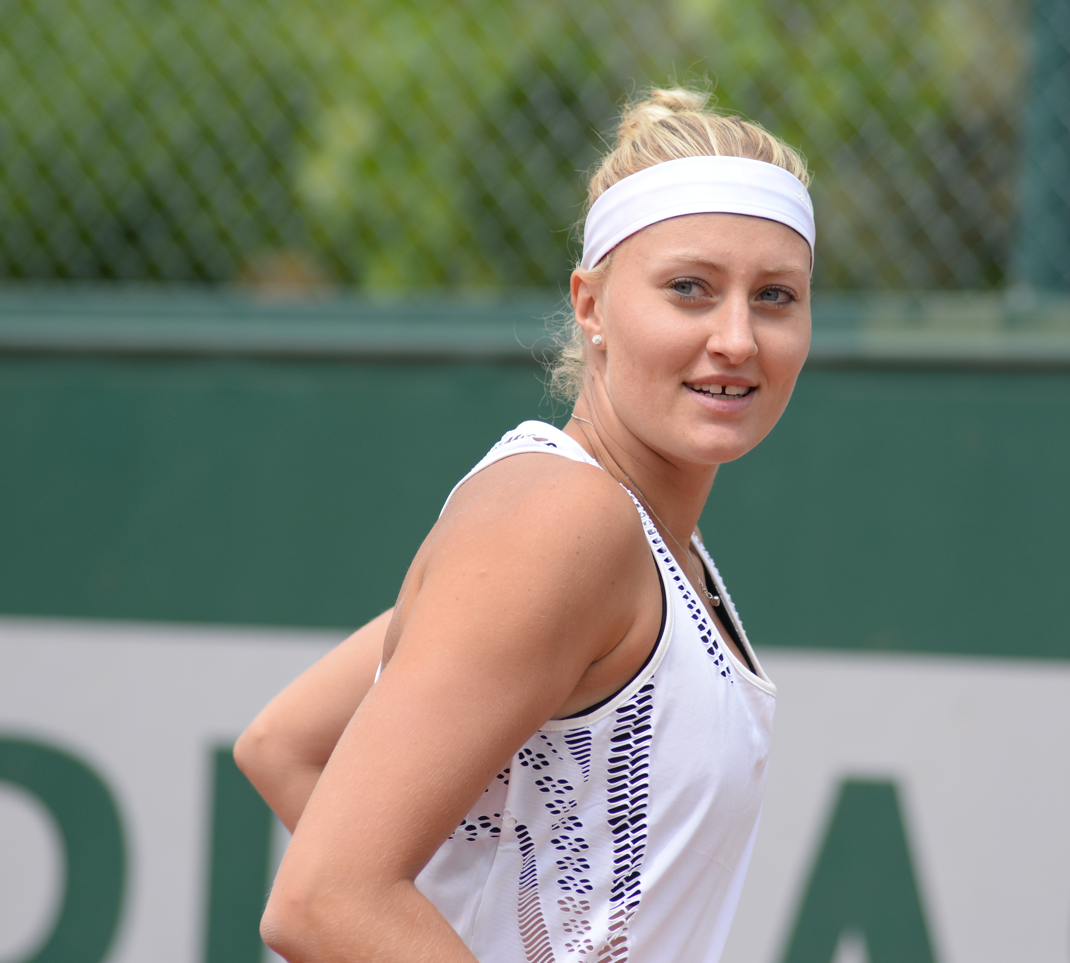 Kristina Mladenovic